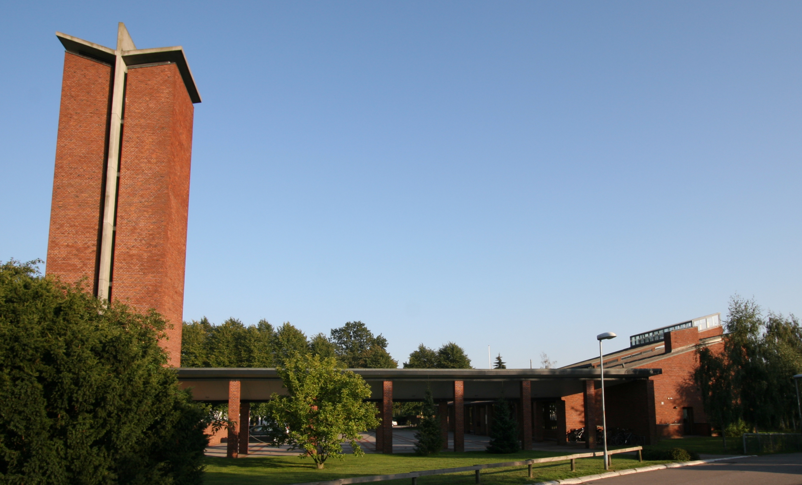 Rønnevang Kirke in Taastrup, Copenhagen County, Denmark. Exterior